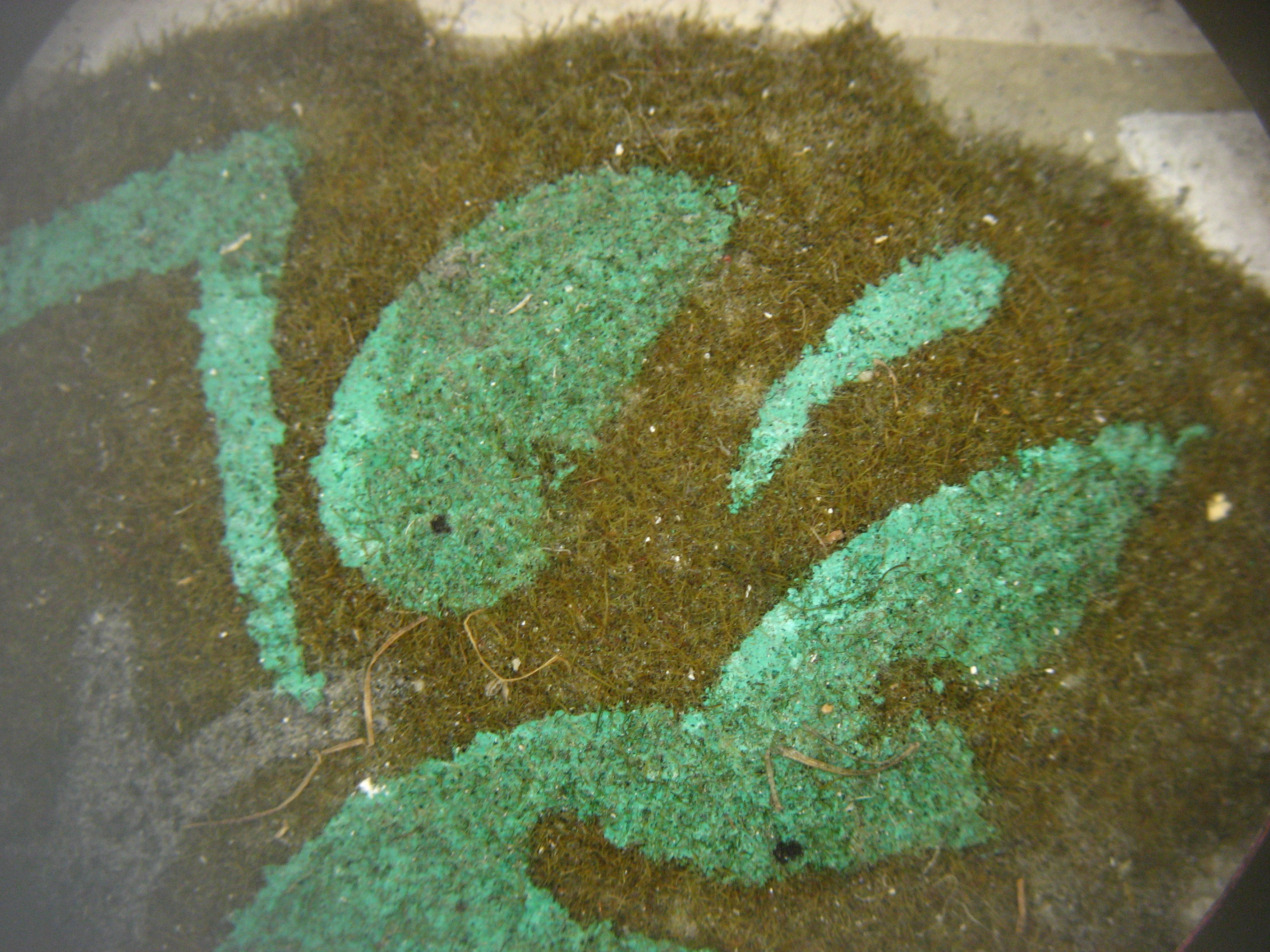 Stark vergrößertes Detail aus der Bordüre der mittleren Tapetenschicht der Schlafzimmertapete: Auf einer olivgrünen Beflockung befindet sich eine grüne (Schweinfurter Grün?) und graue Druckschicht.